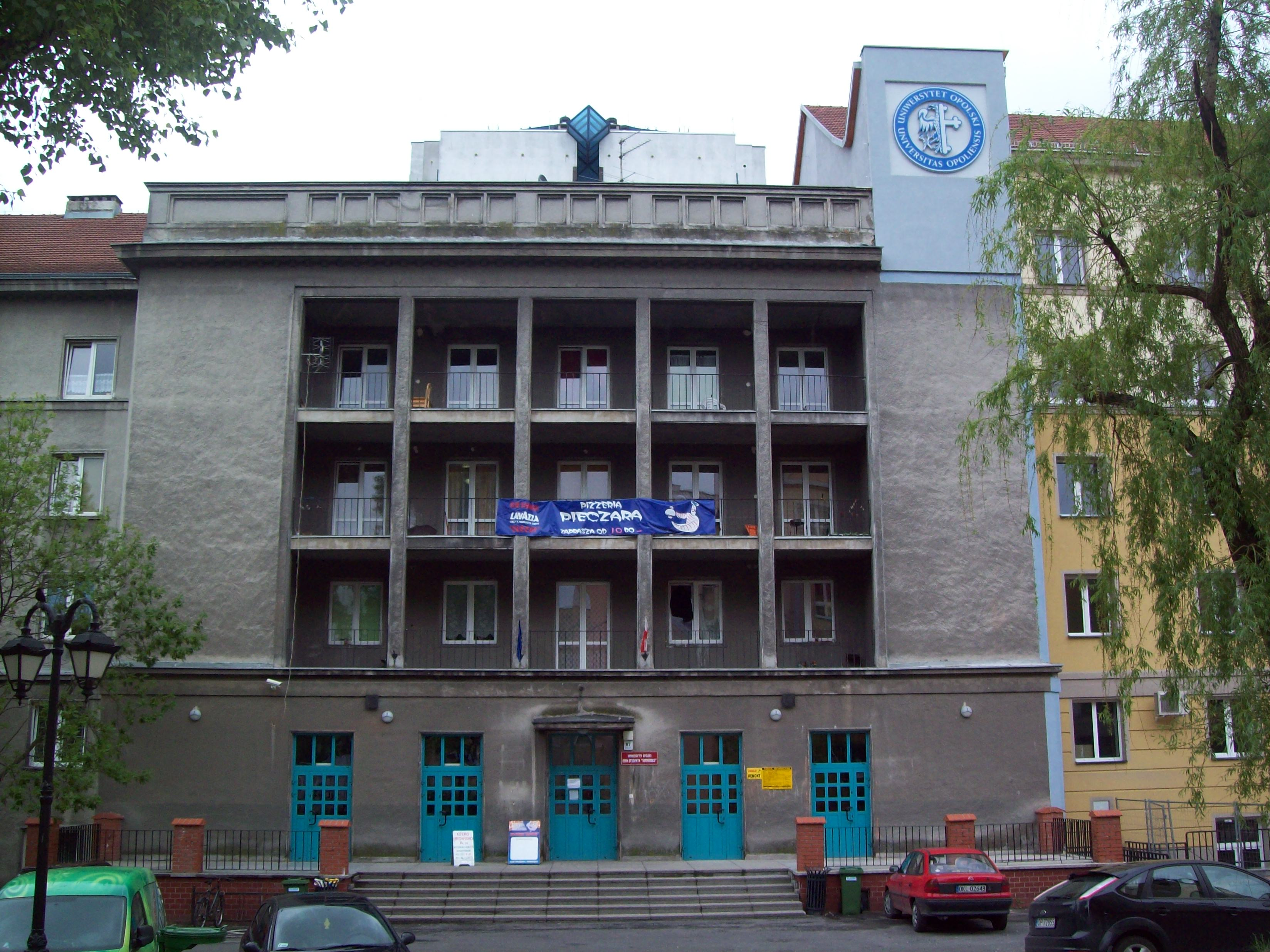 DS "Mrowisko" Uniwersytetu Opolskiego, najstarszy akademik w Opolu.